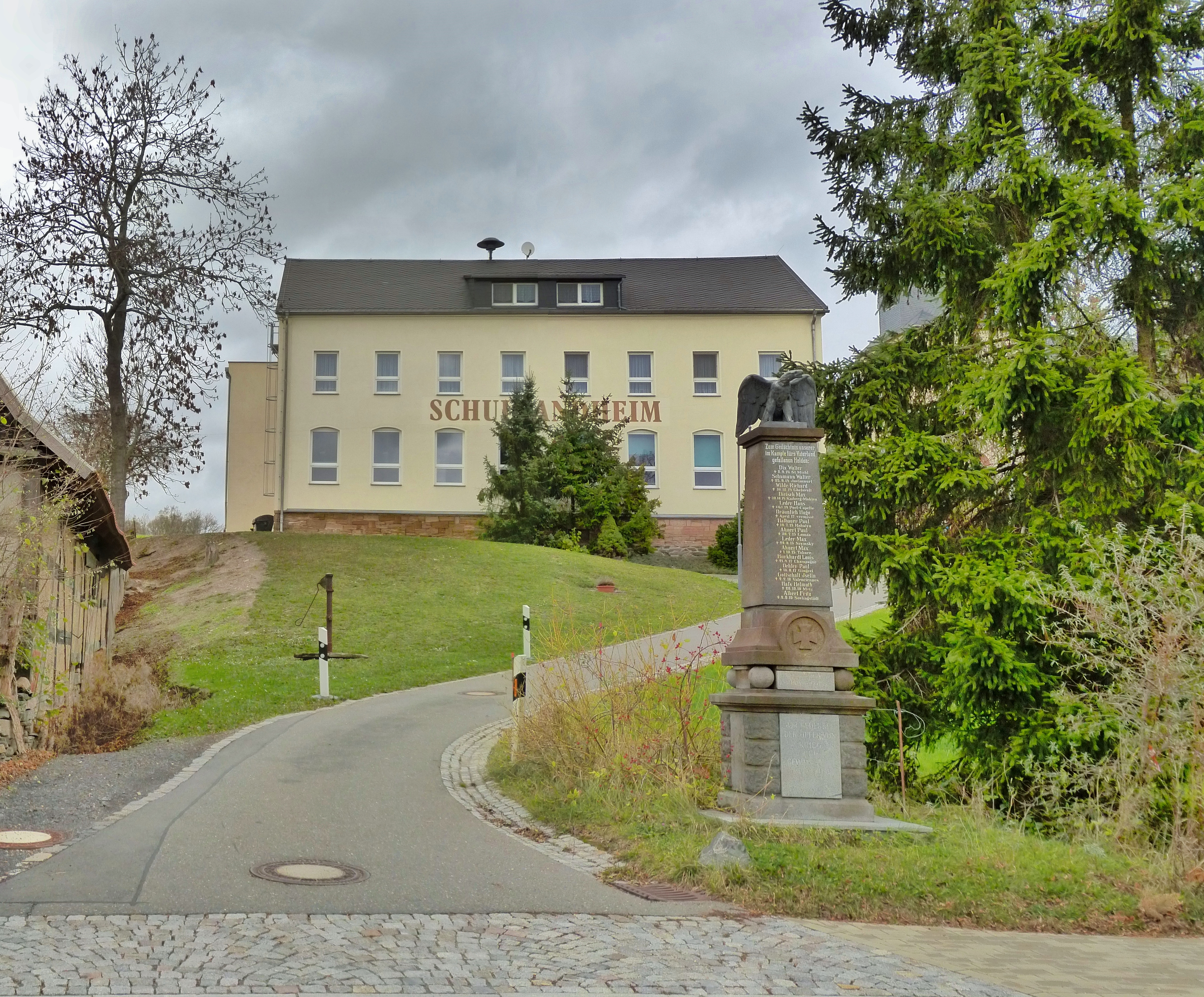 Schullandheim und Kriegerdenkmal in Seelingstädt